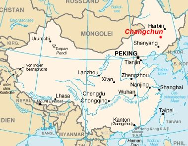 Umístění Čchang-čchun na mapě Číny